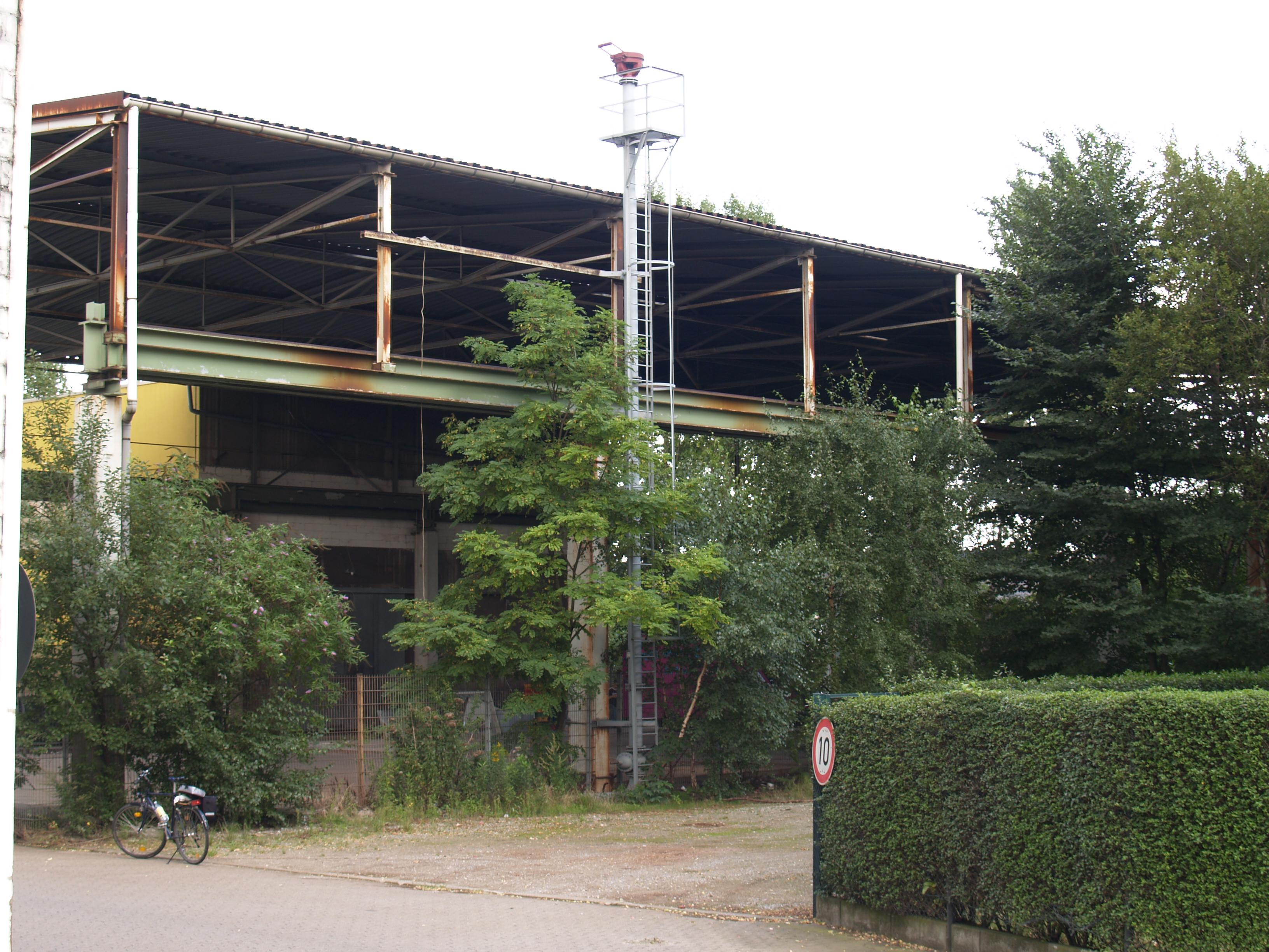 Zeche Friedrich der Große, Schacht 1 Standort